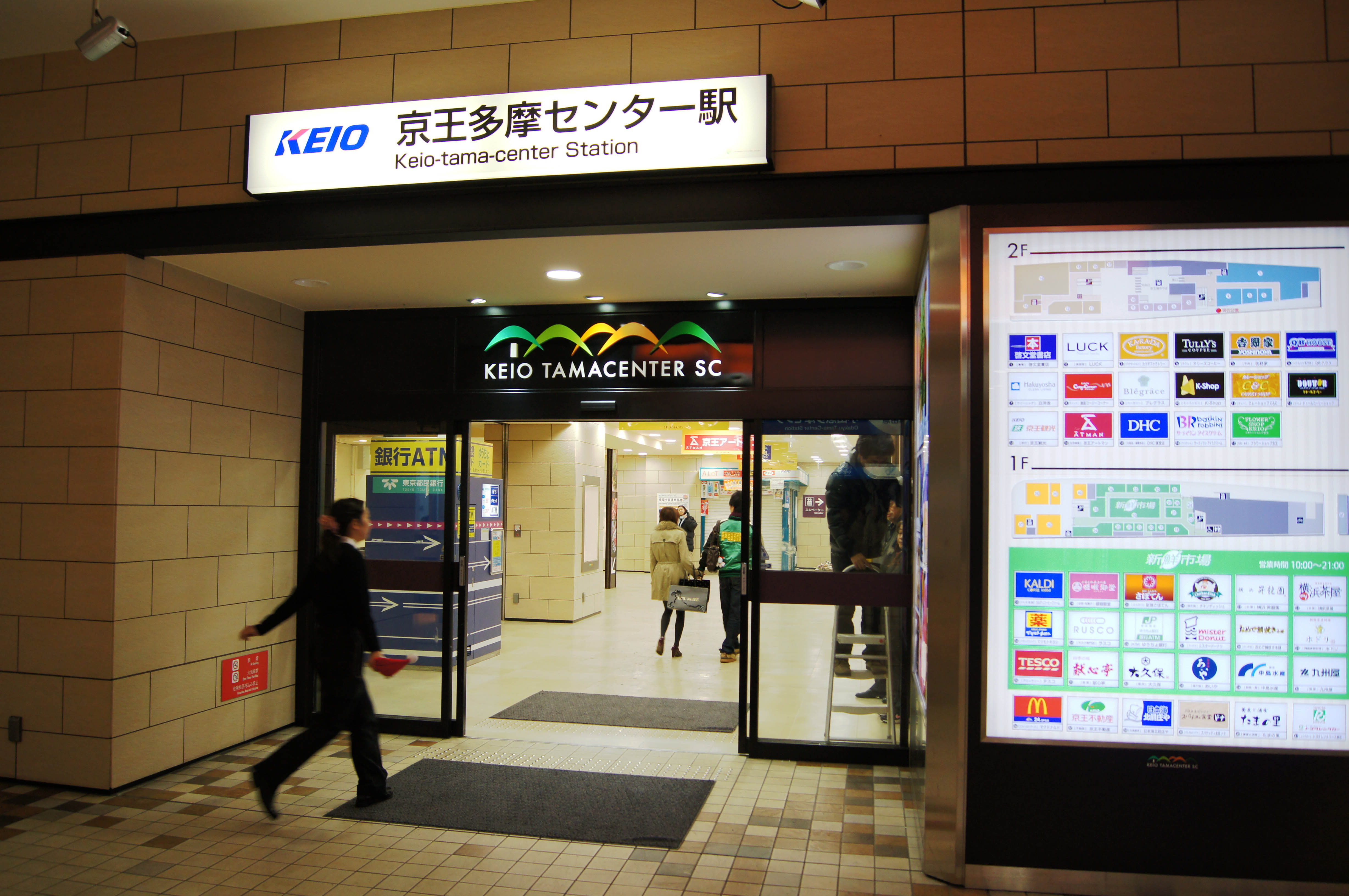 京王電鉄 京王相模原線 京王多摩センター駅 東側 京王多摩センターSC 入口